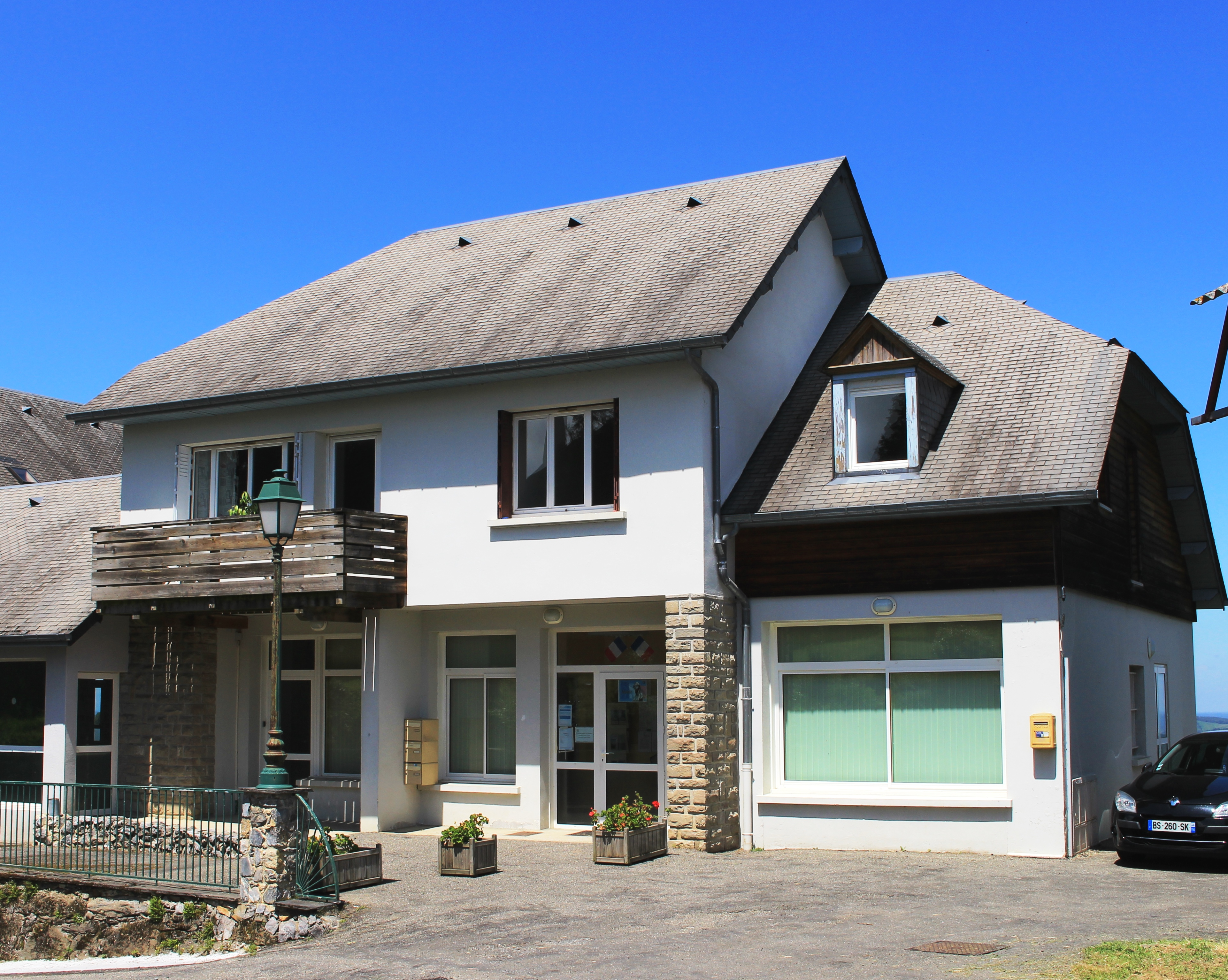 Mairie de Neuilh (Hautes-Pyrénées)